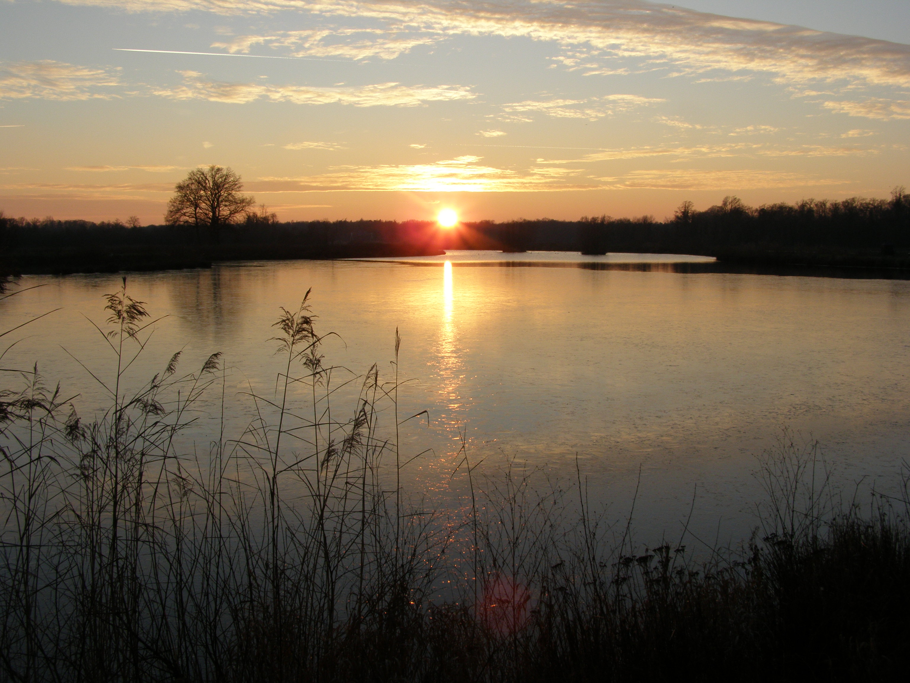 Retentiegebied Woolde nabij Hengelo in de avond. eigen werk